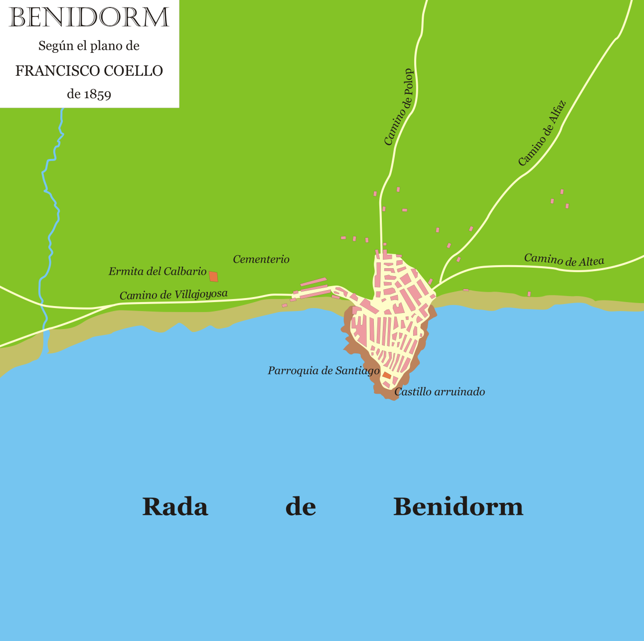 Plano de Benidorm (Alicante) basado en el de Francisco Coello de 1859